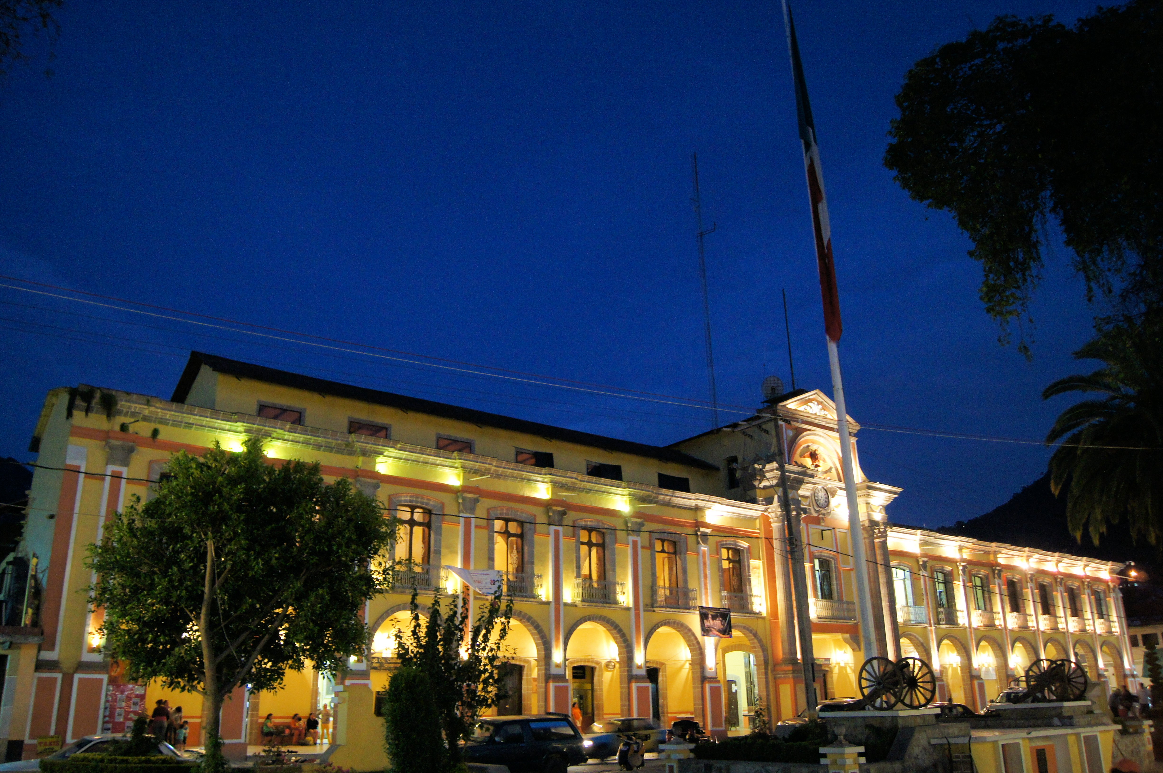 Palacio Municpal de Tetela de Ocampo de noche.